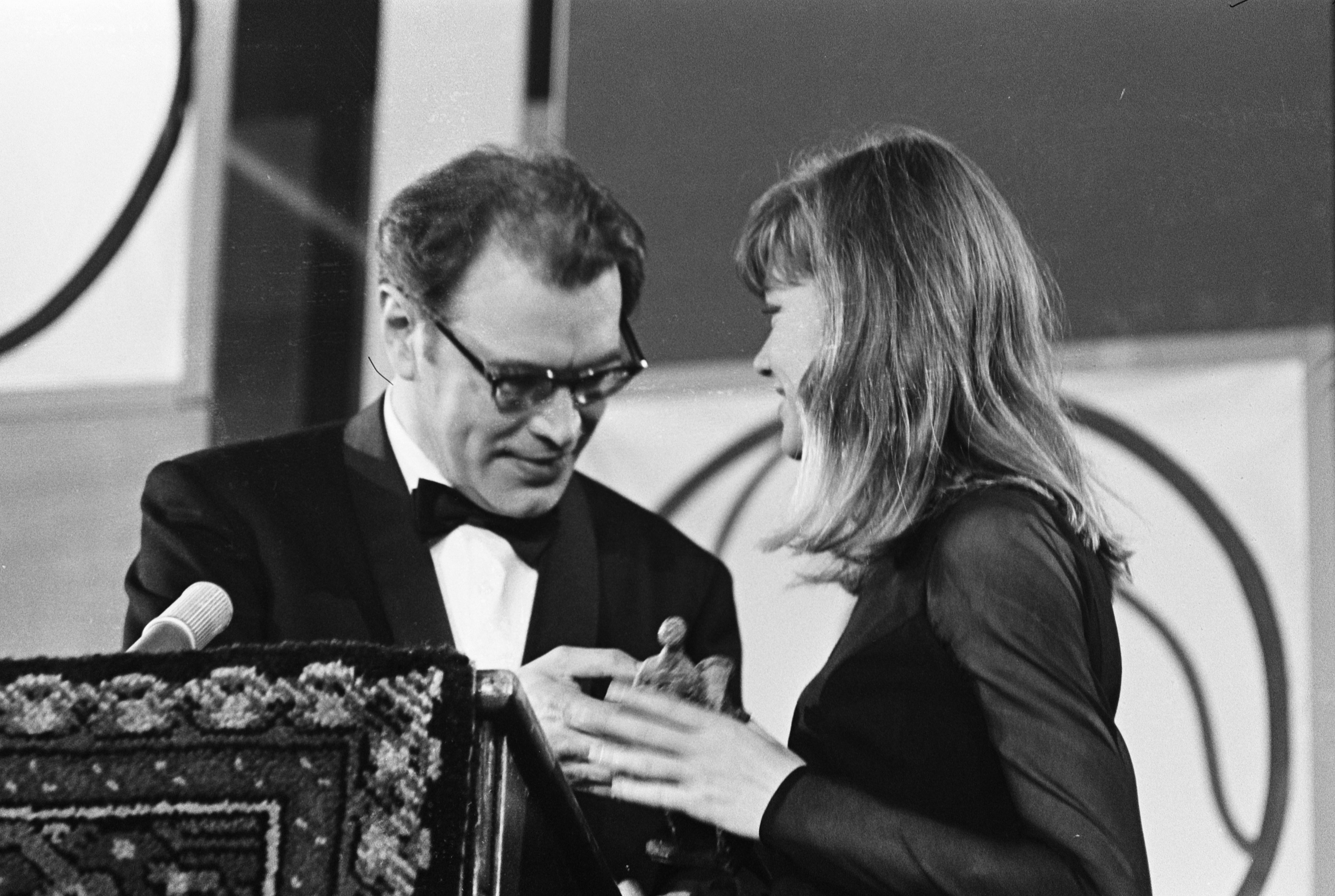 Collectie / Archief : Fotocollectie Anefo Reportage / Serie : [ onbekend ] Beschrijving : Grand Gala du Disque populier in Kurhaus te Scheveningen Nummer 20.21.22 Godfried Bomans en Francoise Hardy Datum : 12 oktober 1963 Locatie : Scheveningen, Zuid-Holland Persoonsnaam : Bomans, Godfried, Francoise Hardy Fotograaf : Koch, Eric / Anefo Auteursrechthebbende : Nationaal Archief Materiaalsoort : Negatief (zwart/wit) Nummer archiefinventaris : bekijk toegang 2.24.01.05 Bestanddeelnummer : 915-6264 Reacties Geplaatst door Maaike op 02 oktober 2013 - 03:48. Grand Gala du Disque Populaire. Francoise Hardy ontvangt in Edison in de categorie 'teenager repertoire' Trefwoorden: uitreiking, prijsuitreiking Persoonsnamen / instellingsnamen: Edison, Grand Gala du Disque Populaire